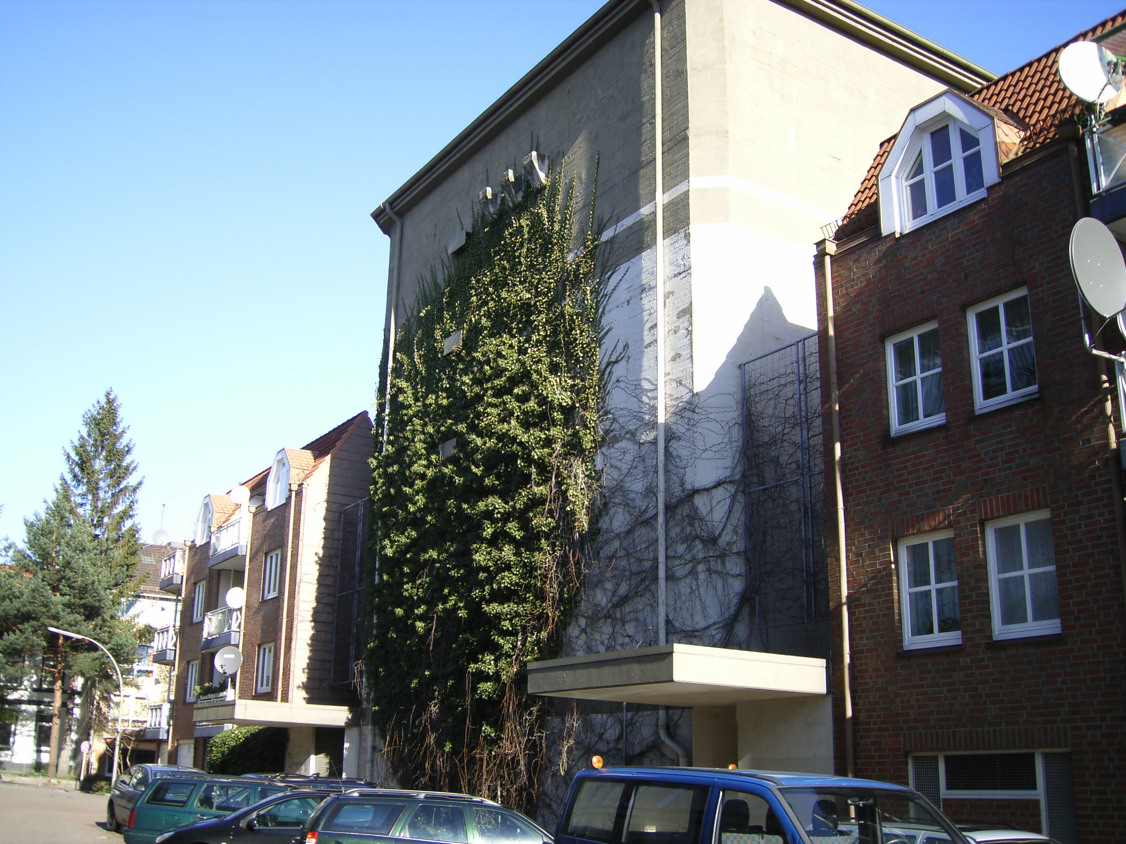 Hochbunker in der Lassallestrasse im Phoenix-Viertel Hamburg-Harburg